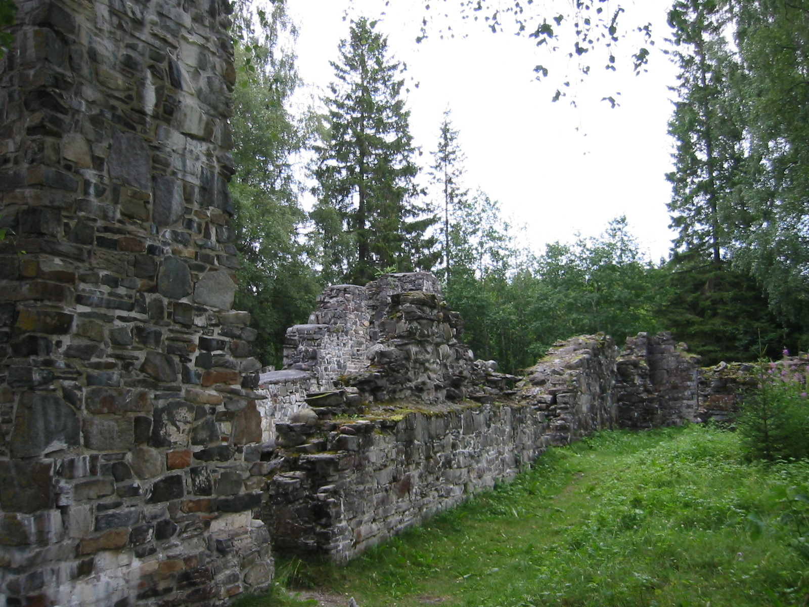 Munkeby kloster, Okkenhaug, Levanger, Norway